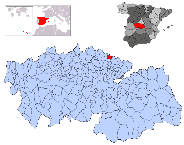 Carranque en la provincia de Toledo